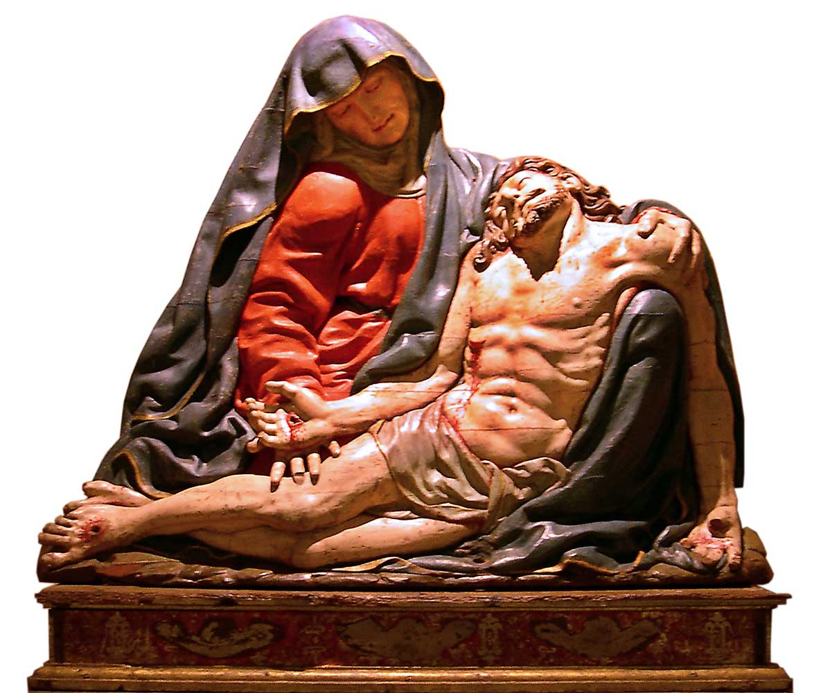 Piedad de Medina del Campo, obra de Juan de Juni en el año 1575. Procede del palacete campestre llamado la Casa Blanca y, actualmente, se conserva en el Museo de las Ferias de Medina del Campo Juan de Juni (1506–1577) Alternative namesJean de JoignyDate of birth/death15061577Location of birth/deathJoigny, FranceValladolid (Spain)Work periodRenaissance/MannerismWork location Italy, France, Spain (Valladolid)